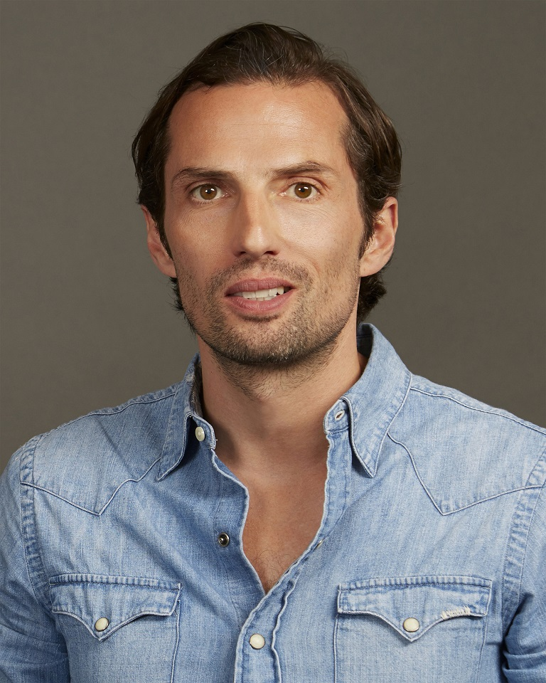 Porträt Quirin Berg 2018